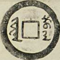 天聪汗钱背面拓印